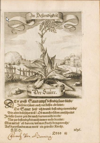 Widmungsbild der Fruchtbringenden Gesellschaft für Franz Graf von Hennin. Aus: Der Fruchtbringenden Geselschaft Nahmen/ Vorhaben/ Gemählde und Wörter : Nach jedes Einnahme ordentlich in Kupfer gestochen/ und In achtzeiligen Reimgesetze verfasset ... / Franckfurt am Mayn : Merian, 1646